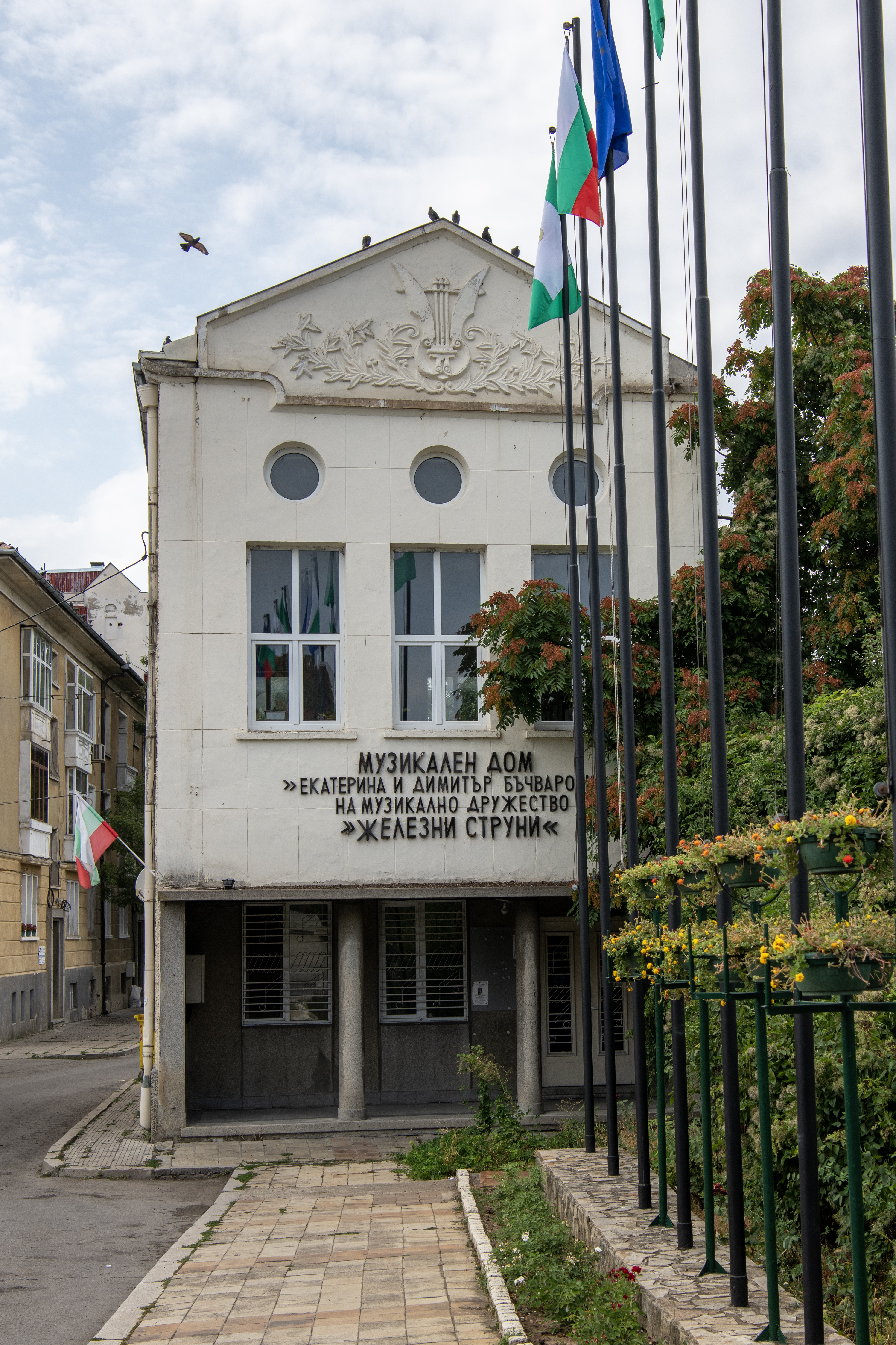 Снимката документира музикалния дом "Железни струни" в град Разград.